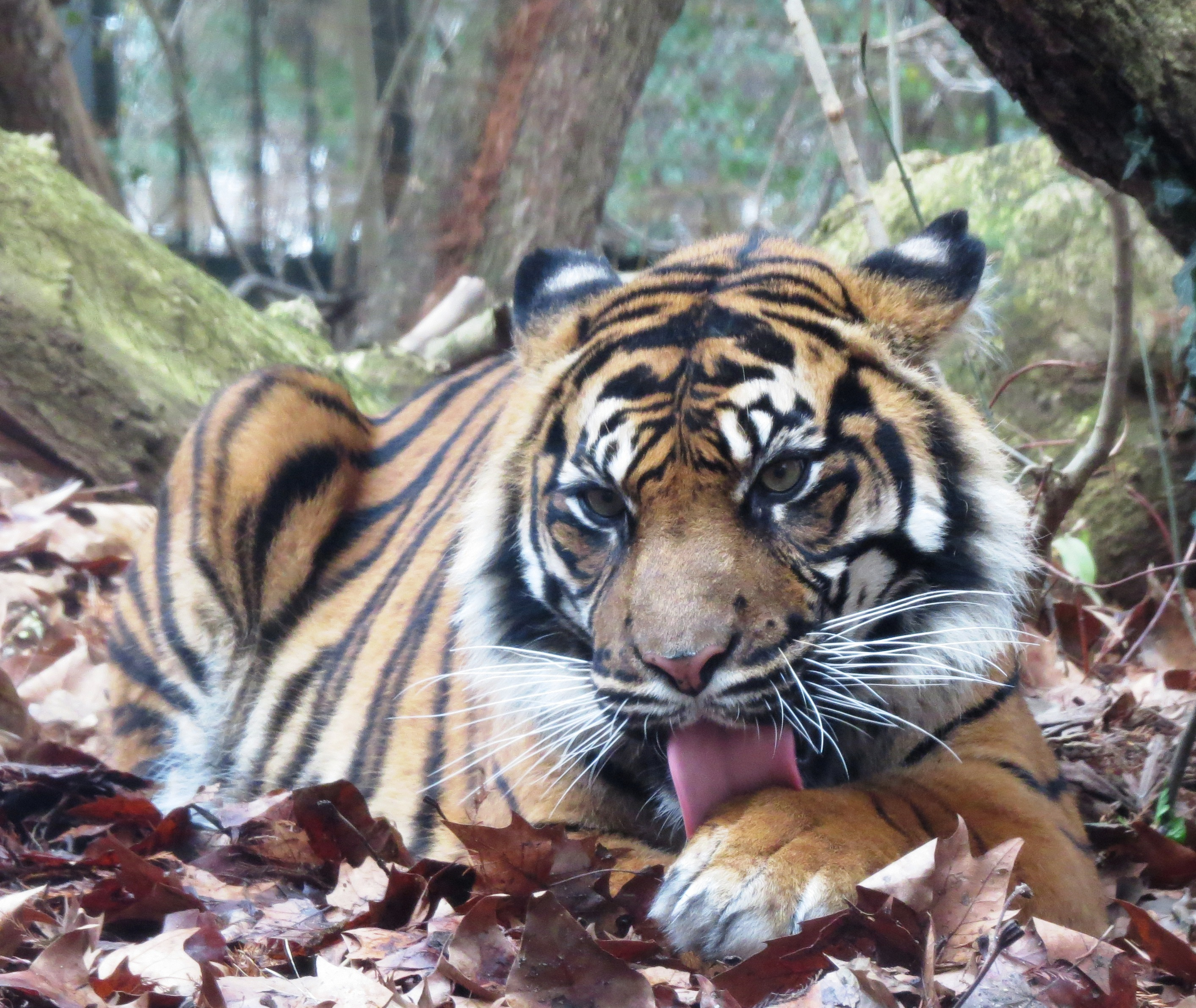 Sumatra Tiger im Frankfurter Zoo